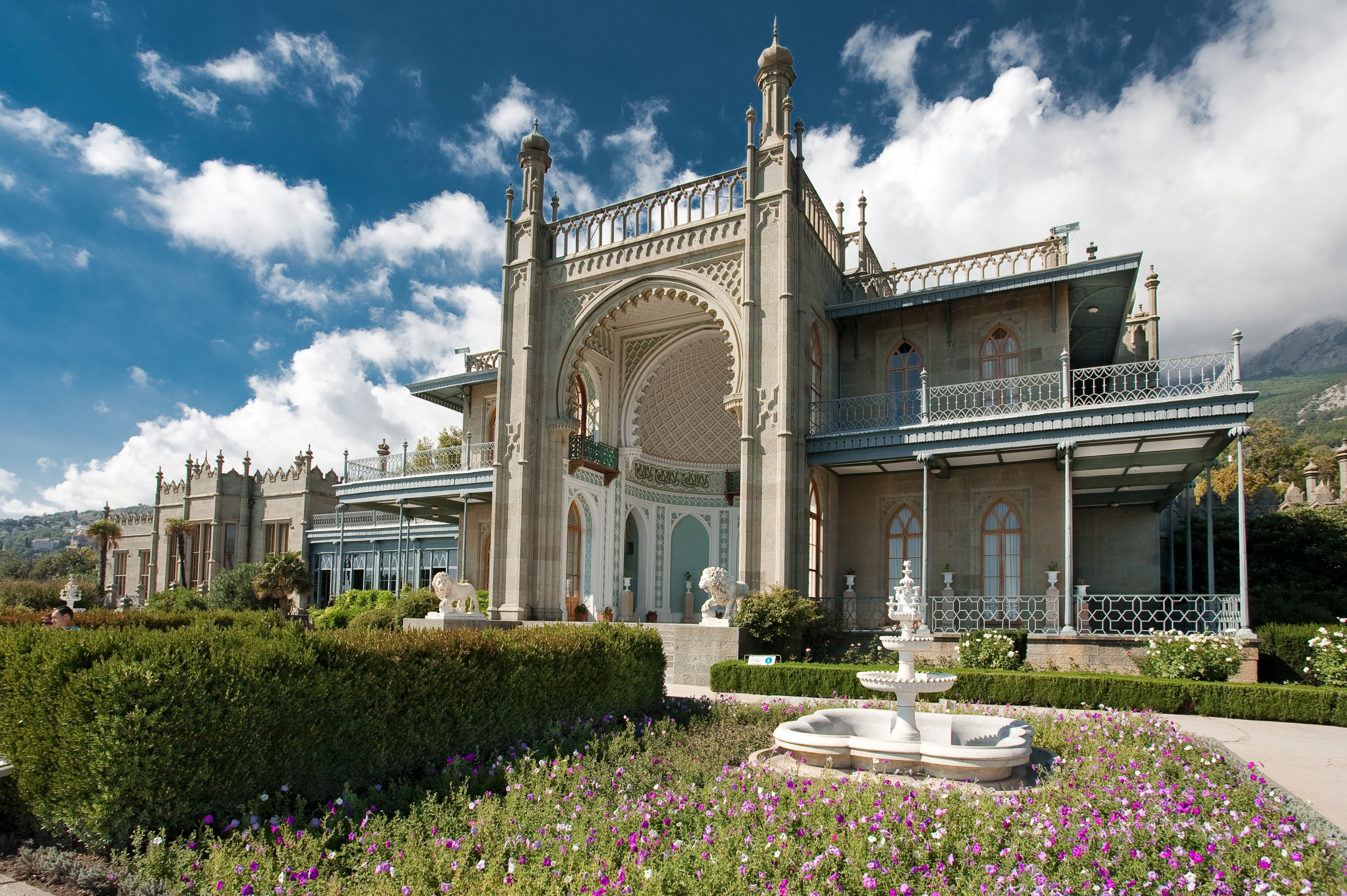 Алупка вул. Дворцове шосе, 18